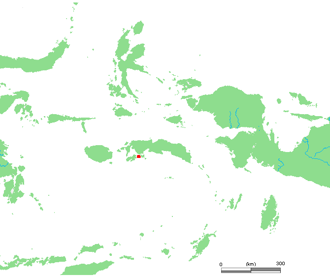 ID Haruku.PNG